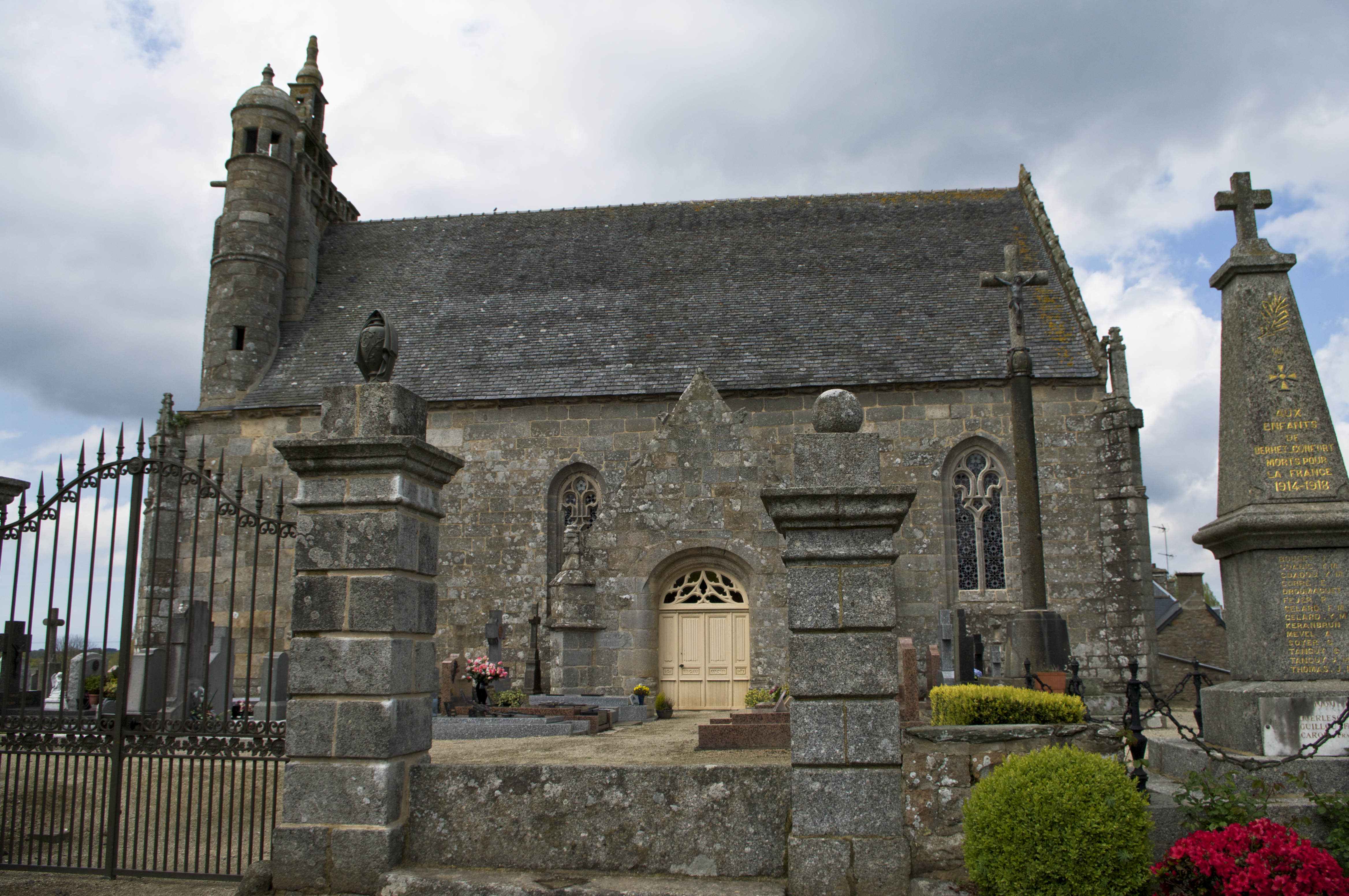 Chapelle Notre-Dame-de-Comfort est situé dans la commune de Berhet, dans le département français des Côtes d'Armor